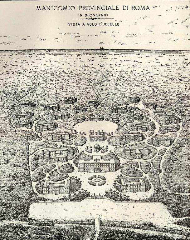 Veduta aerea dell'area ospitante l'ospedale psichiatrico di Santa Maria della Pietà, sita in locailità Sant'Onofrio, nei pressi del Monte Mario a Roma